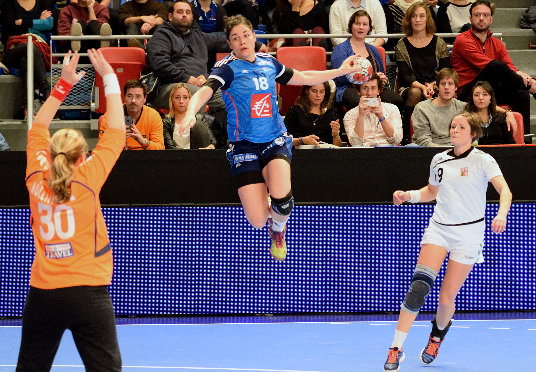 Chloé Bulleux Le 29 novembre 2015, lors du match France / République Tchèque pour le compte du TIPIFF 2015. Au stade Pierre de Coubertin à Paris.